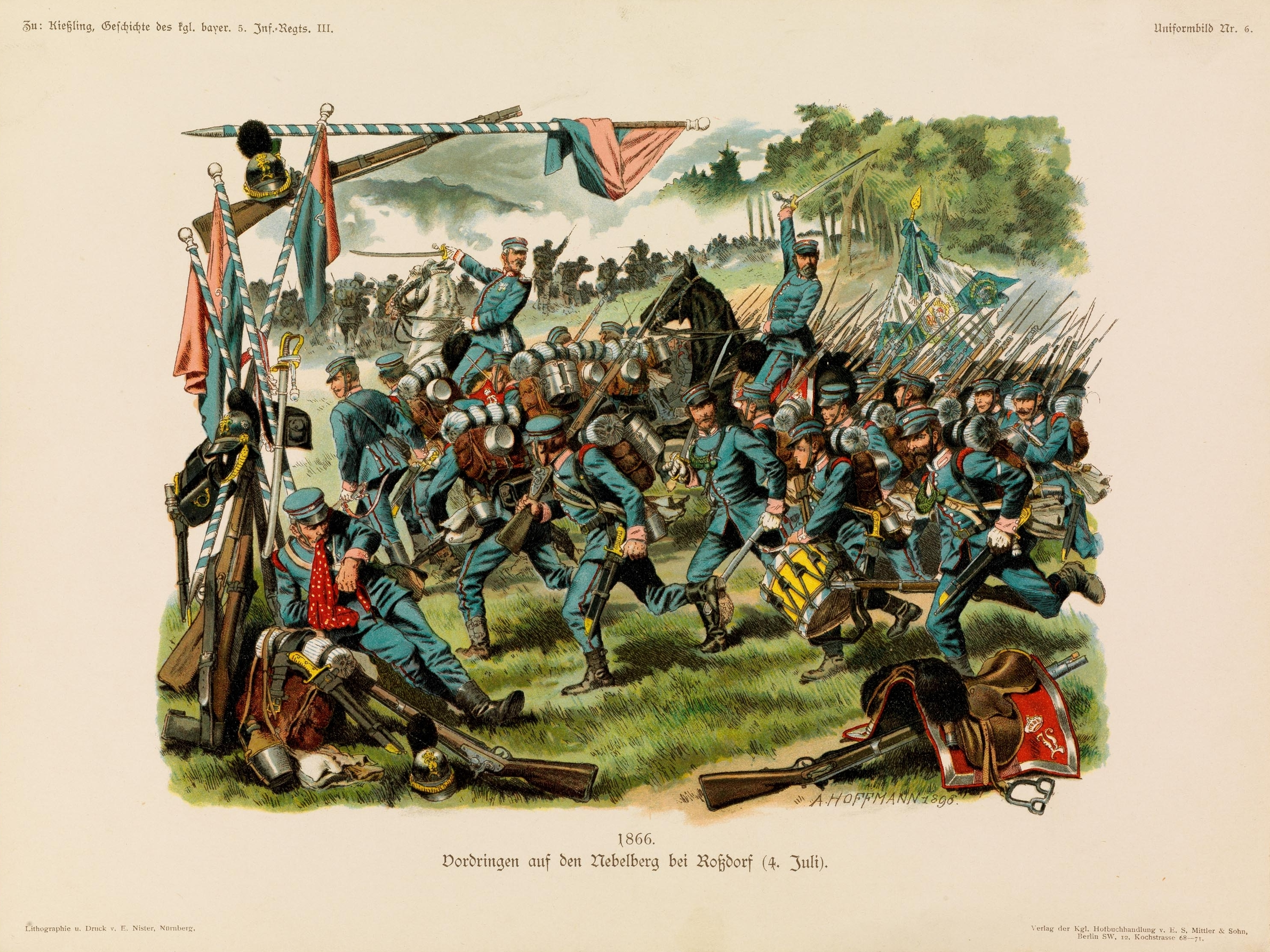 Uniform-Bilder zur Geschichte des Königl. Bayer. 5. Infanterie-Regiements Grossherzog Ernst Ludwig von Hessen. Lithographie und Druck v. E. Nister, Nürnberg. Verlag der Kgl. Hofbuchhandlung v. E. S. Mittler & Sohn, Berlin.